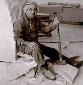 Severiano Grande